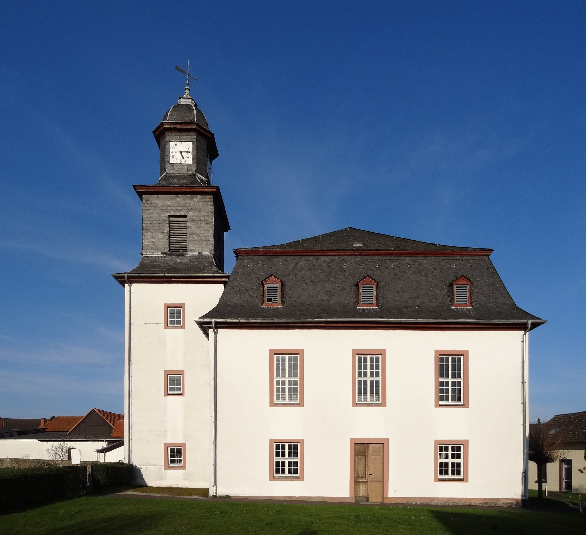 Evangelische Kirche Birklar